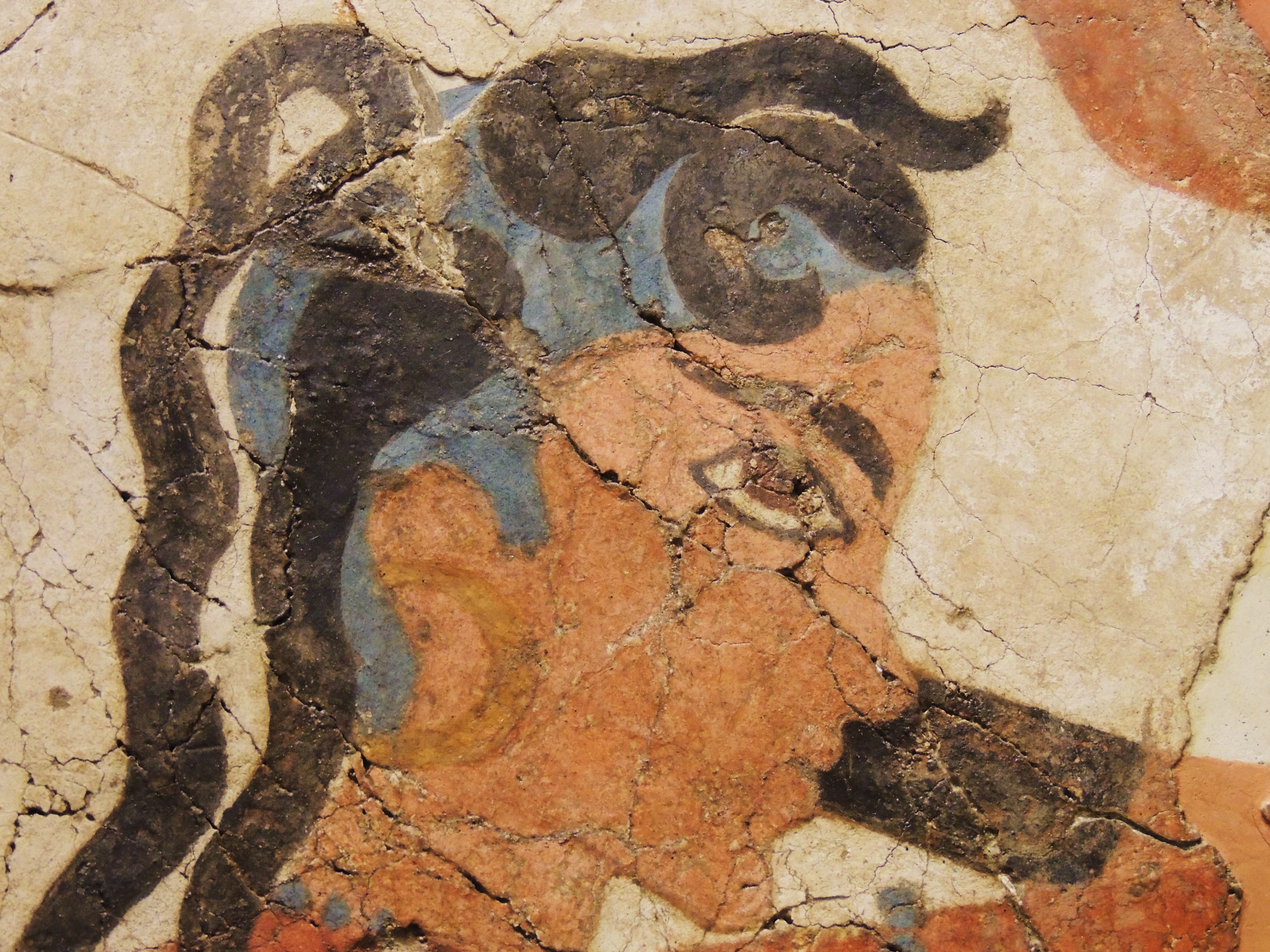 The Thira boxer